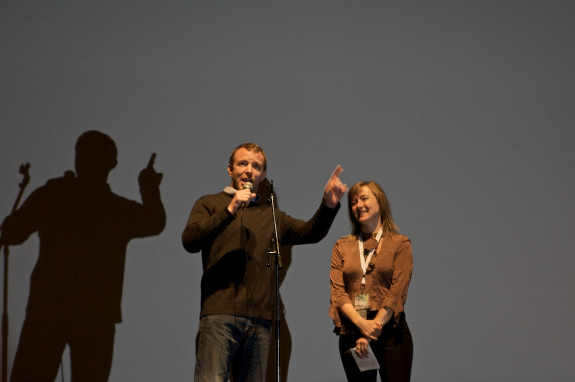 TIFF 2008 - RocknRolla.